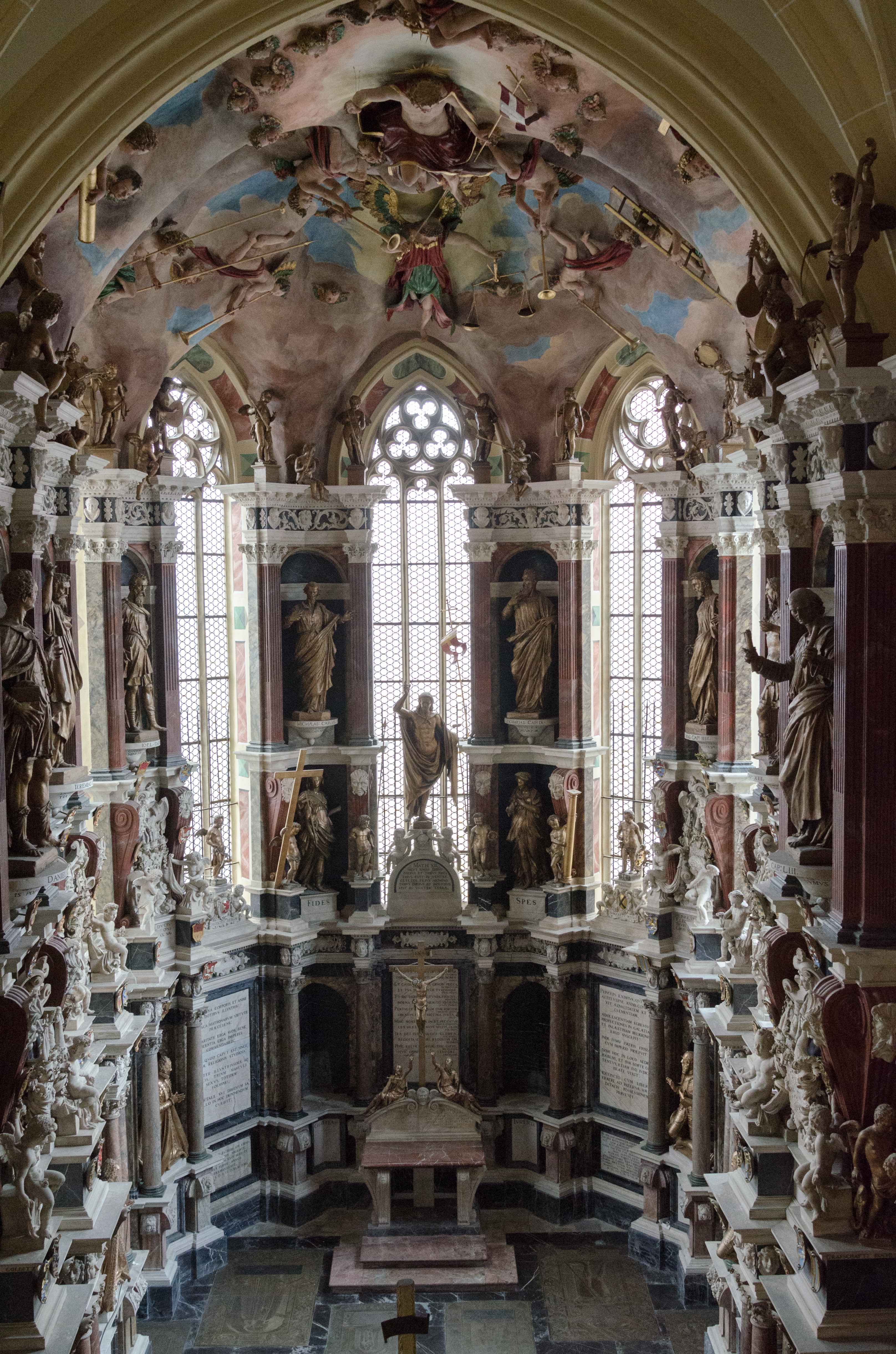 Freiberger Dom